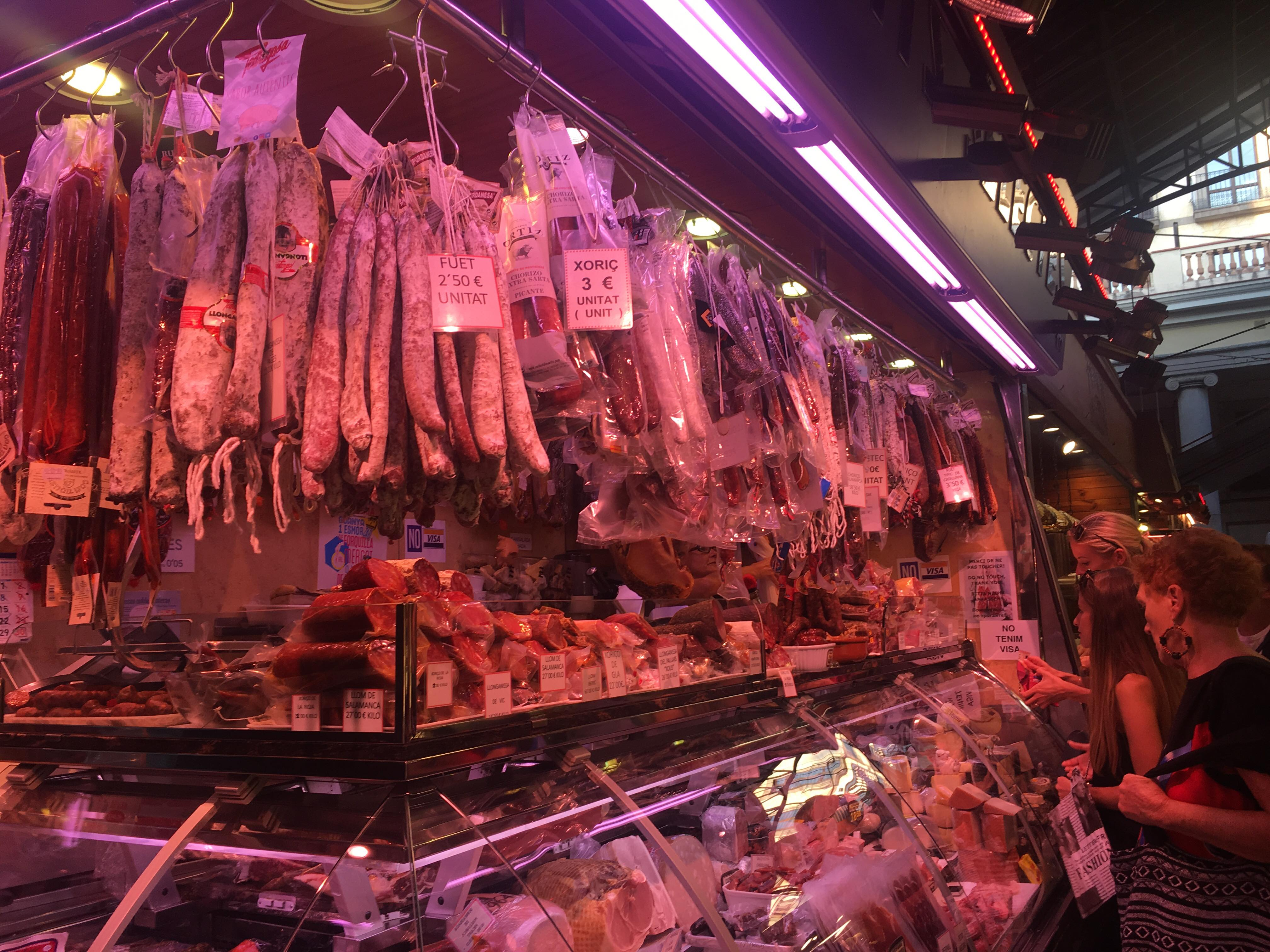 Foto tomada en el mercado de La Boquerìa en la ciudad de Barcelona, donde se encuentra una gran variedad de embutidos fermentados-secados como el fuet